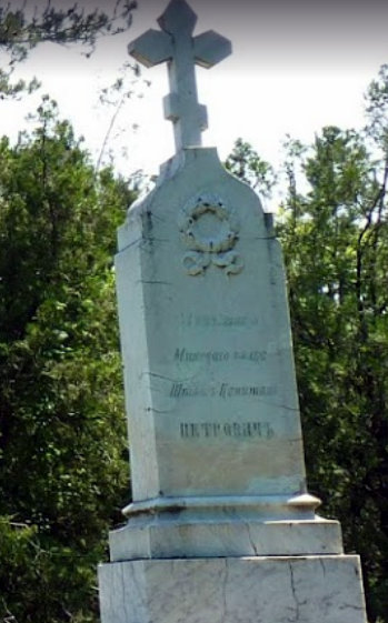 Паметник на щабс капитан Антон Петрович Кожухаров от 54-ти Мински полк, българин и руски поданик.